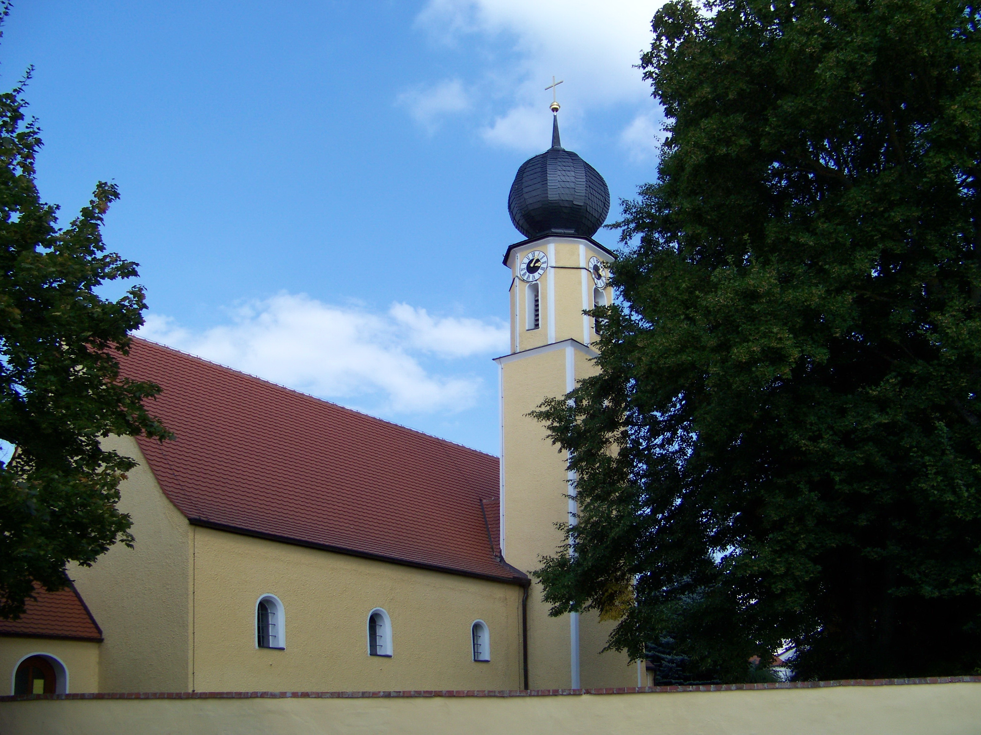 Mintraching, Mangolding, Kirchstraße 3. Kath. Nebenkirche St. Peter und Paul. Saalbau mit eingezogenem Chor und Halbwalmdach, Flankenturm mit Zwiebelhaube und Vorzeichen, 13. Jahrhundert, Verlängerung im Barock; mit Ausstattung.